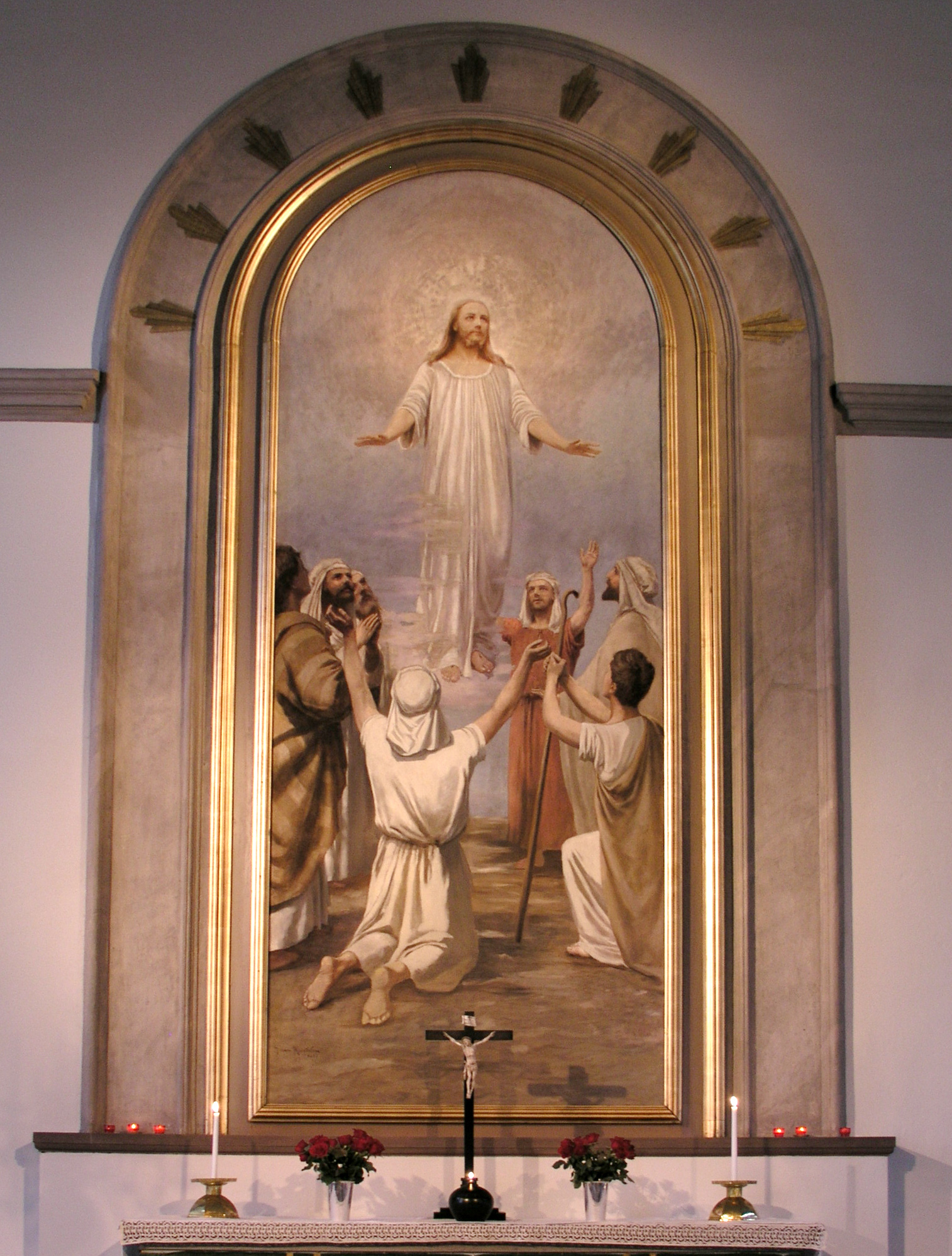 Kärna kyrka, Malmslätt. Diocese of Linköping. Sweden. Painting by Johan Krouthén 1893. Altar painting.